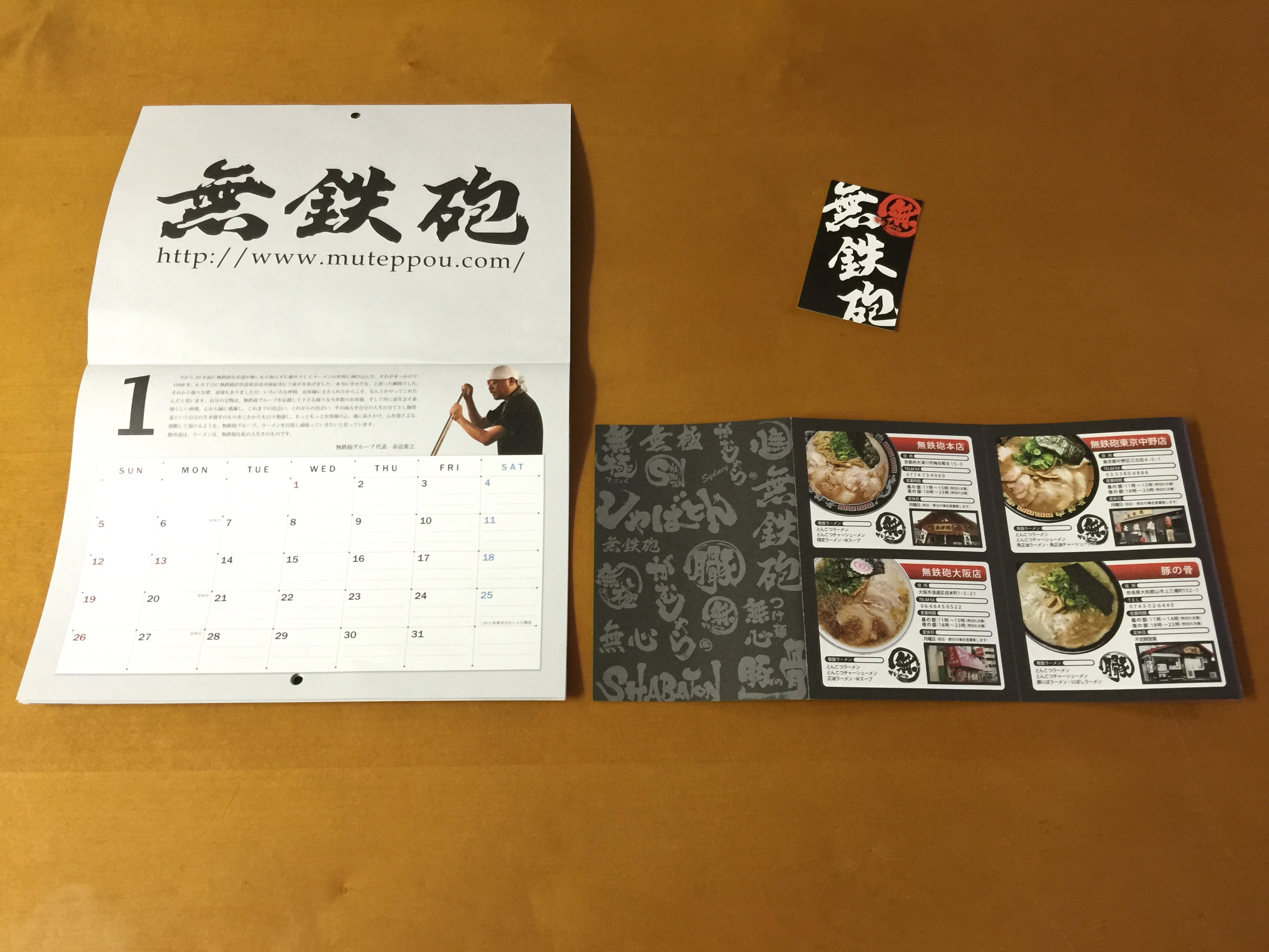 Muteppou memorial calendar.